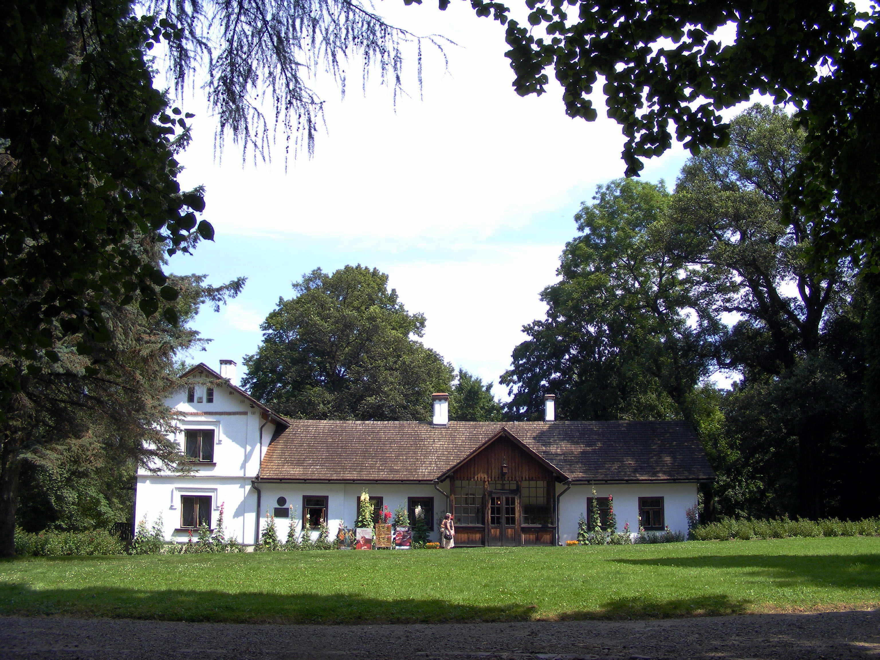 Dworek Marii Konopnickiej w Żarnowcu, obecnie muzeum.